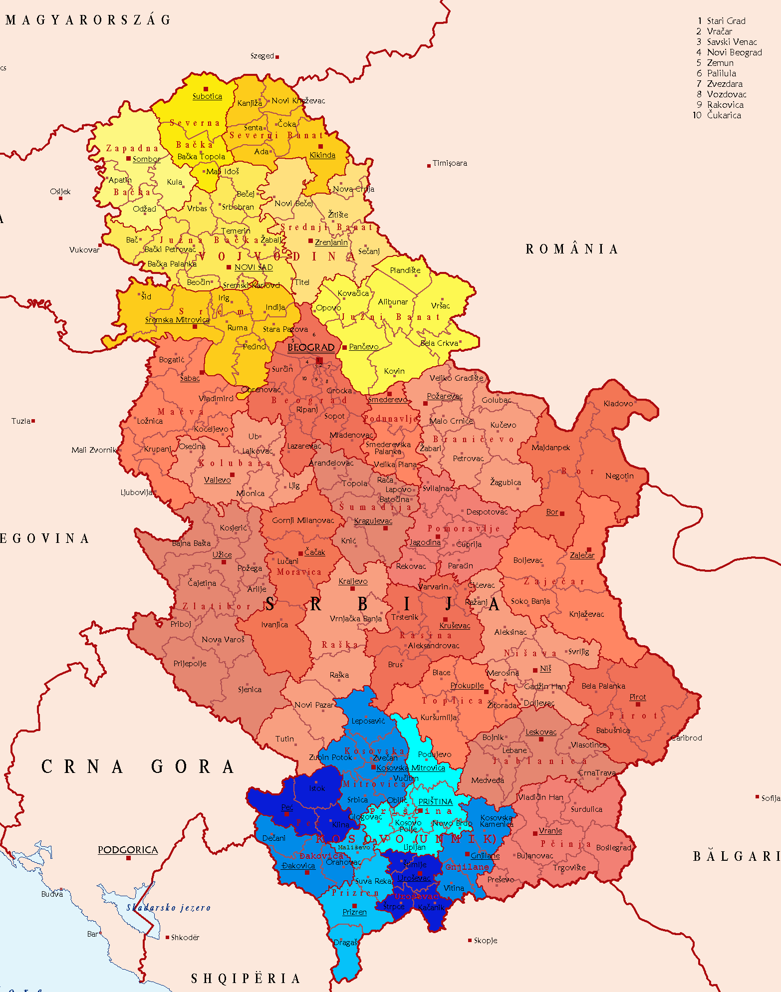 Districts of Serbia, de jure, 2008/Districts de Serbie, de jure, 2008